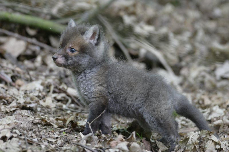 Rotfuchswelpe